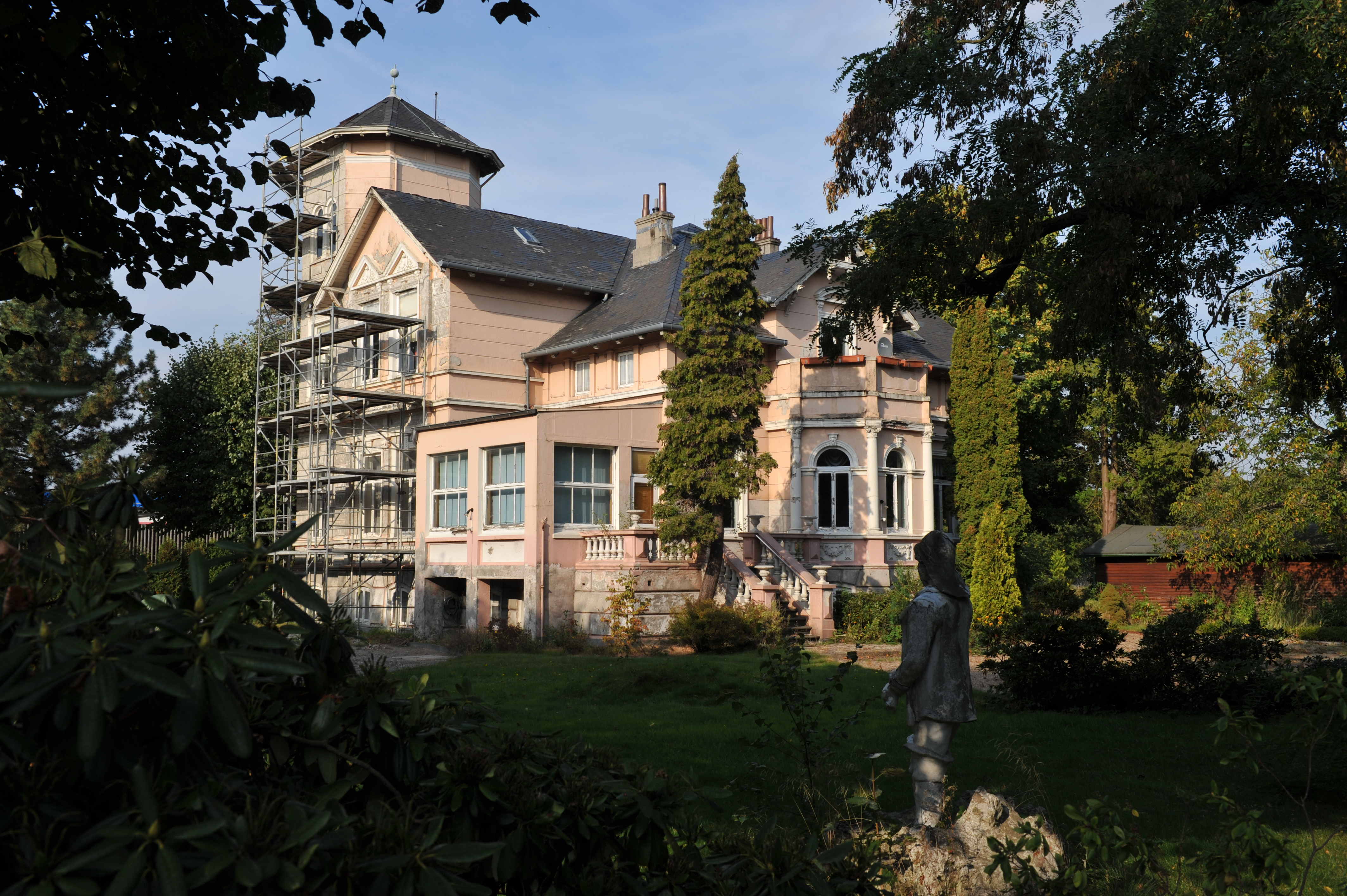 Historical building in Bremerhaven, northern Germany Villa Busse, Weserstraße 237, 1894-1895 von Georg Fäsenfeldt Das abgebildete Objekt ist ein geschütztes Kulturdenkmal in der Freien Hansestadt Bremen, mit der Nr. 1648 beim Landesamt für Denkmalpflege registriert.